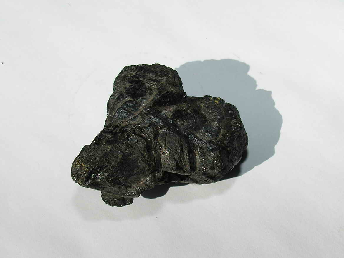 Hulla